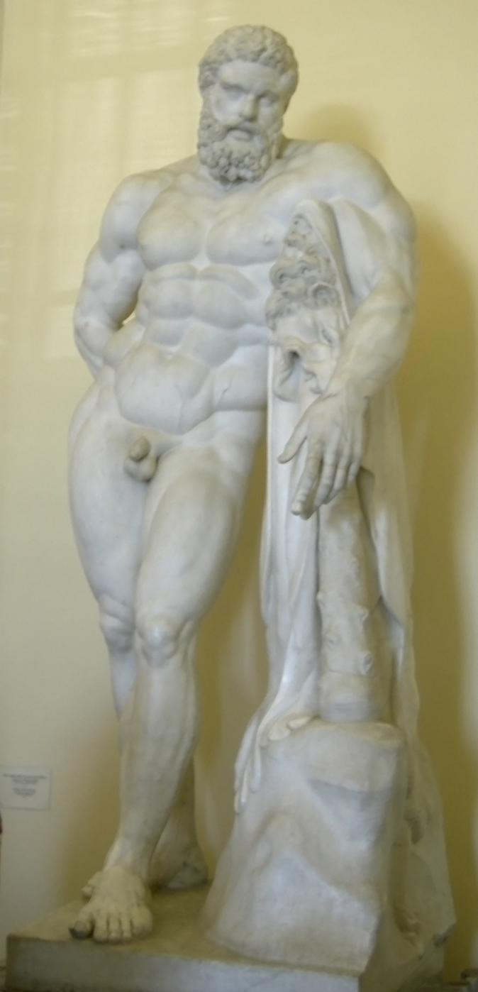 Итальянский скульптор XVIII в. Геркулес Фарнезский (с античного оригинала). Мрамор. Эрмитаж, Санкт-Петербург.